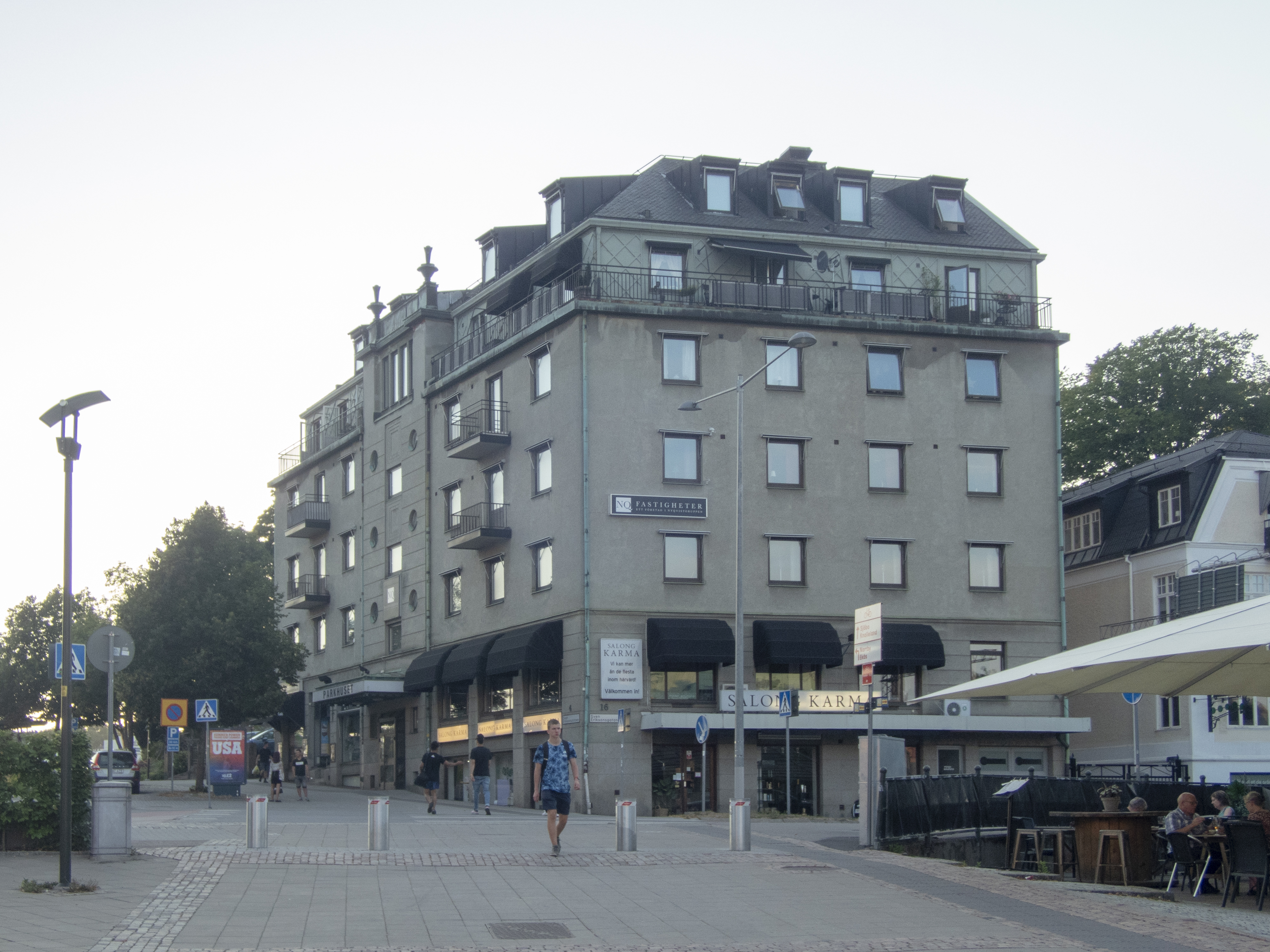 Flundran 4, "Parkhuset" vid Sven Eriksonsplatsen 4 Borås. Uppfört 1930 som Park Hotell. Arkitekt: Viktor Theodor Breikull